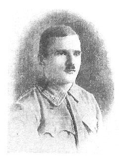 Karel Boháček, český malíř